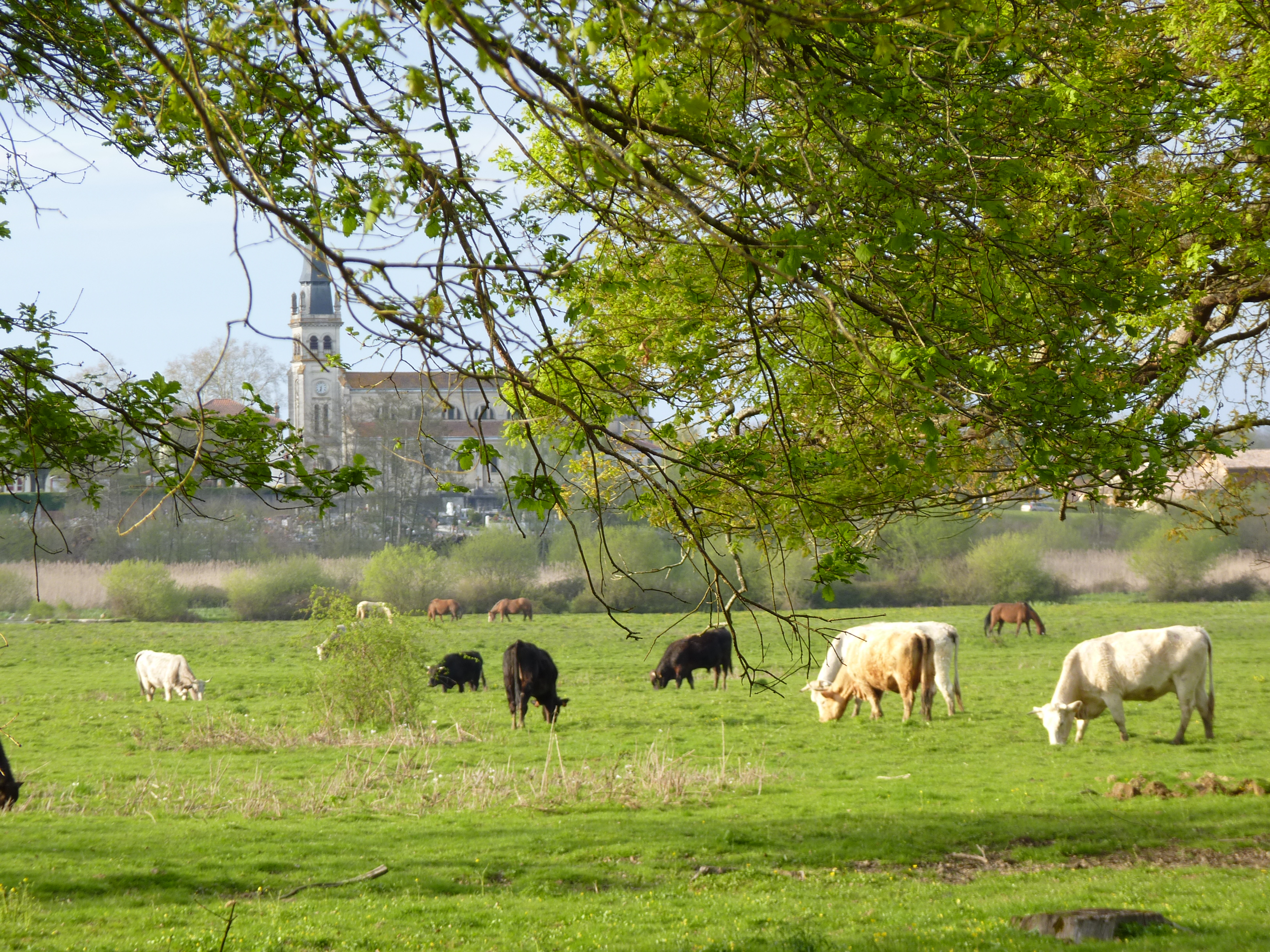 Pâturages des Barthes de l'Adour à Saint-Vincent-de-Paul